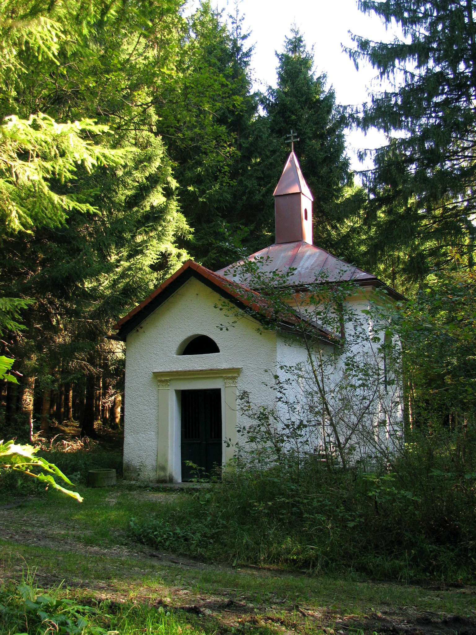 Kindswieskapelle bei Neufahrn, Gemeinde Egling in Oberbayern